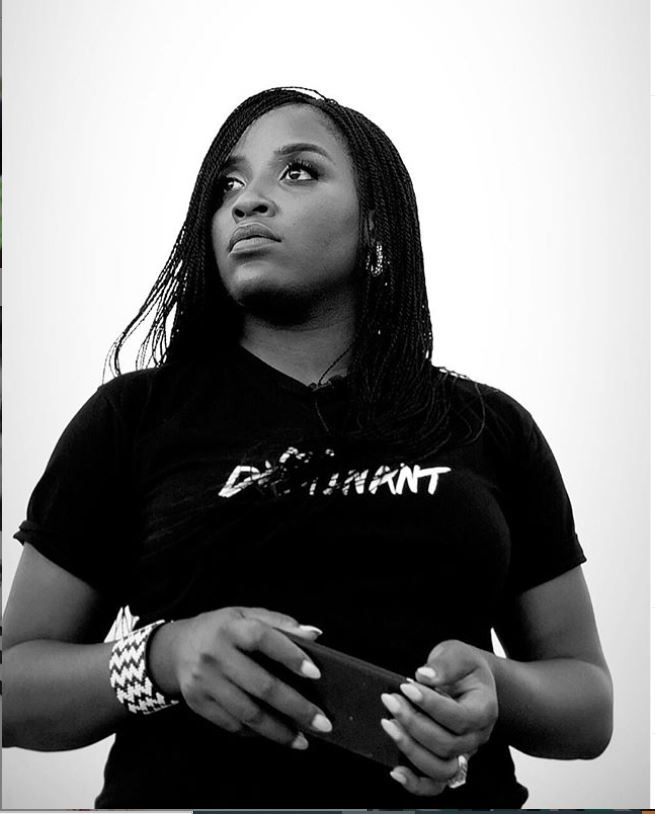 la photo